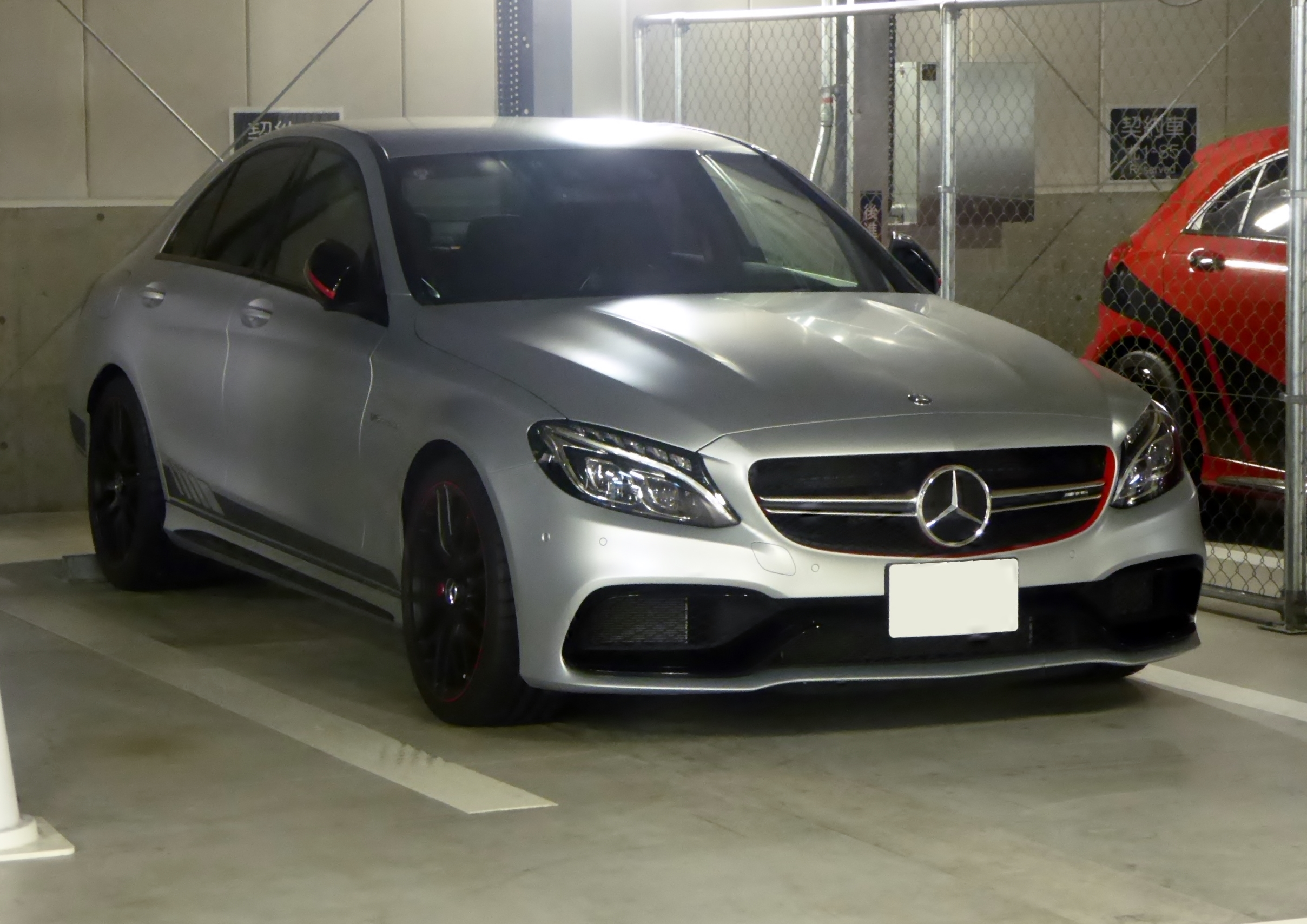 W205型メルセデス・AMG C63 S Edition 1をフロントから撮影。